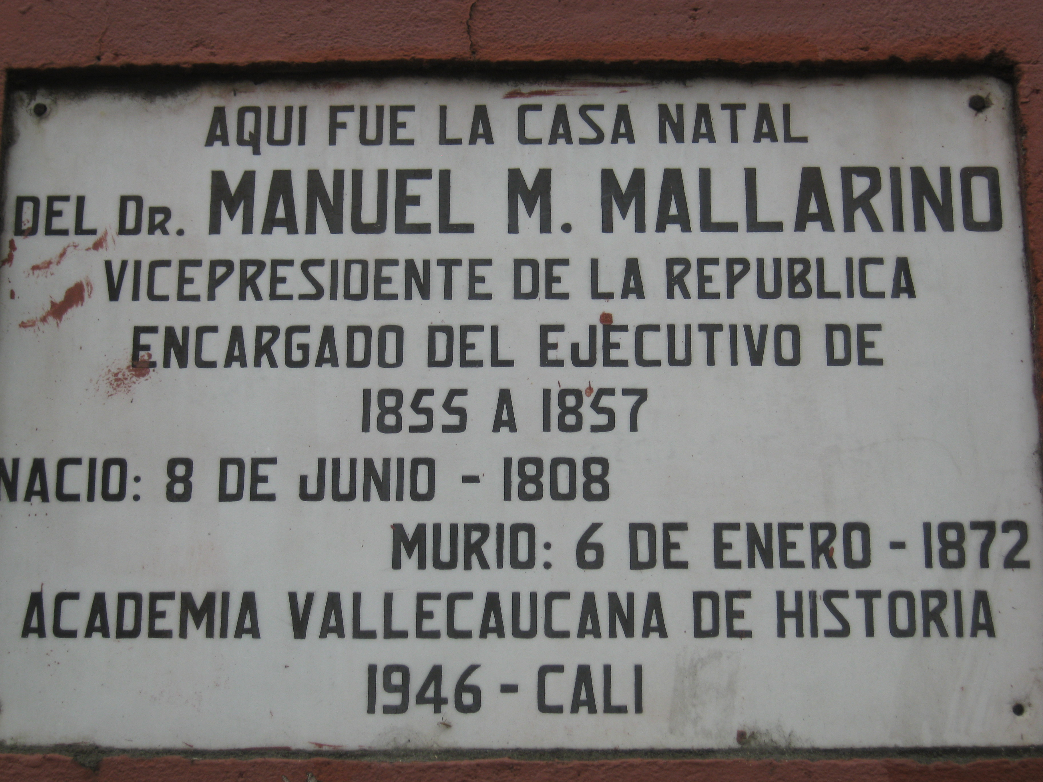 Placa conmemorativa al viceprecidente Manuel M. Mallarino